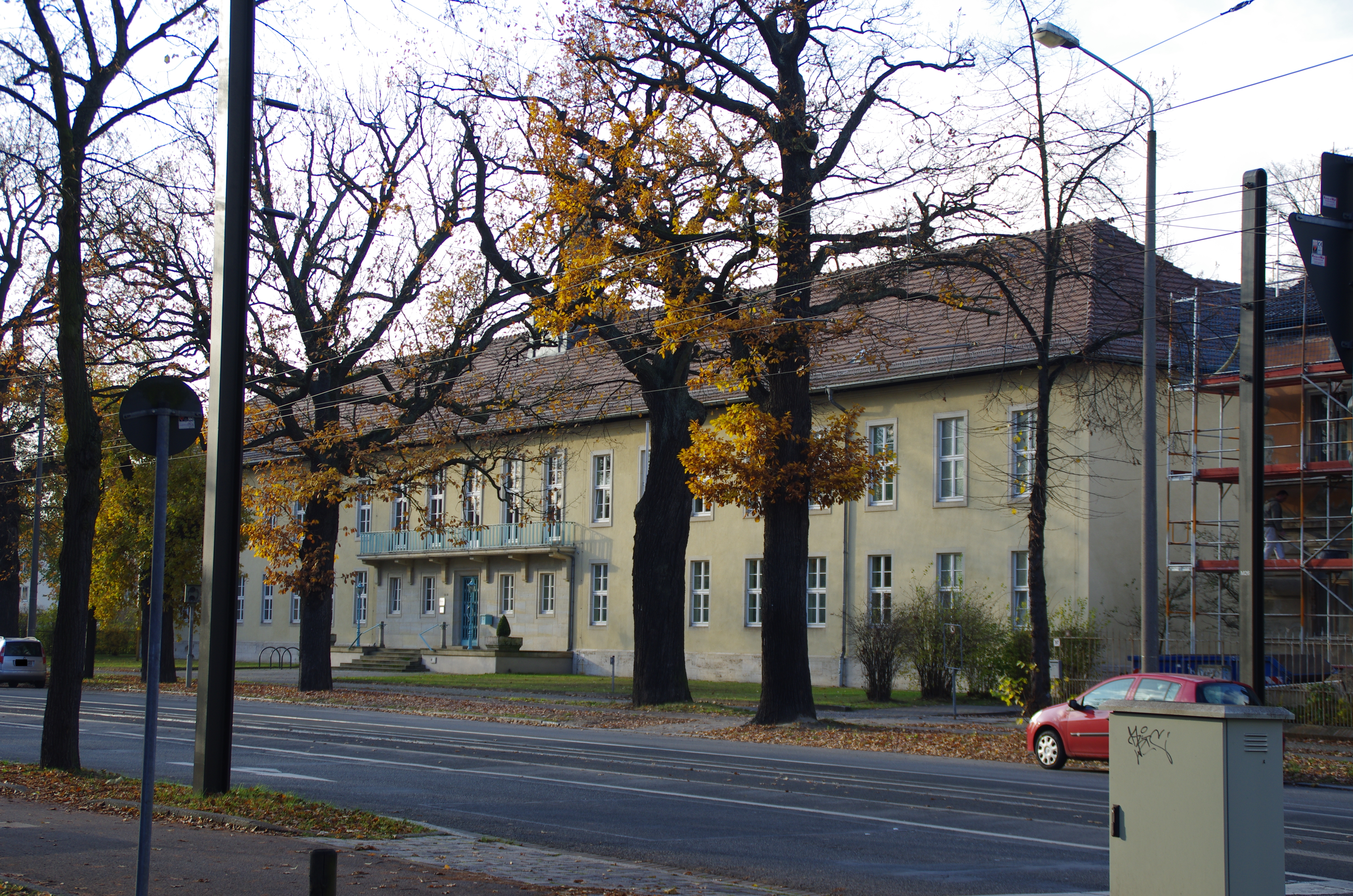 Potsdam in Brandenburg. Das Haus Berliner Straße 98-101 steht unter Denkmalschutz.